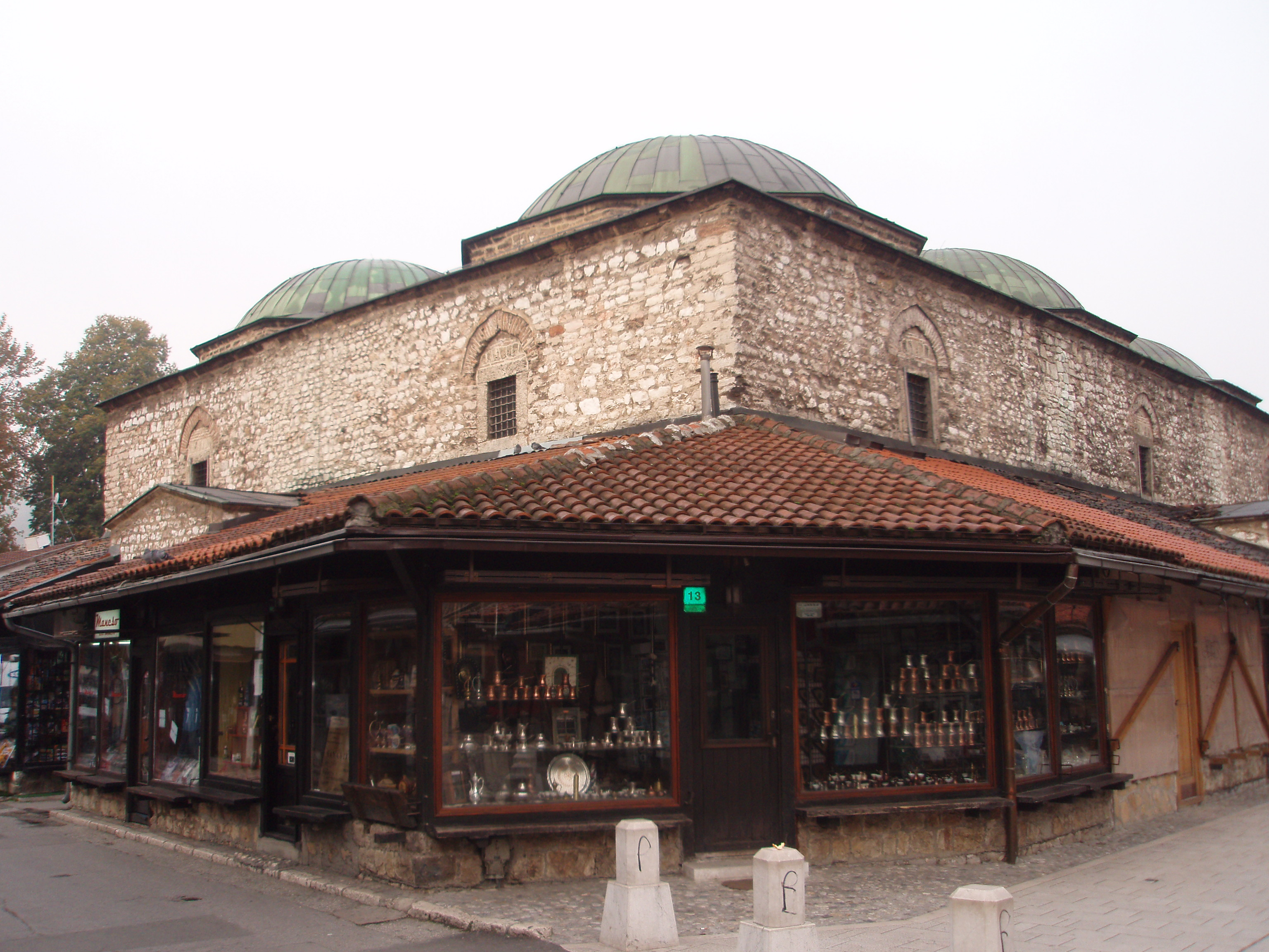 Baščaršija